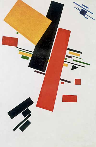 Картина Казимира Малевича 1915 года